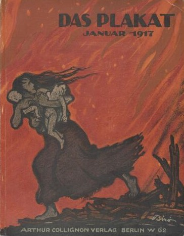 Mihály Bíró Das Plakat Januar 1917